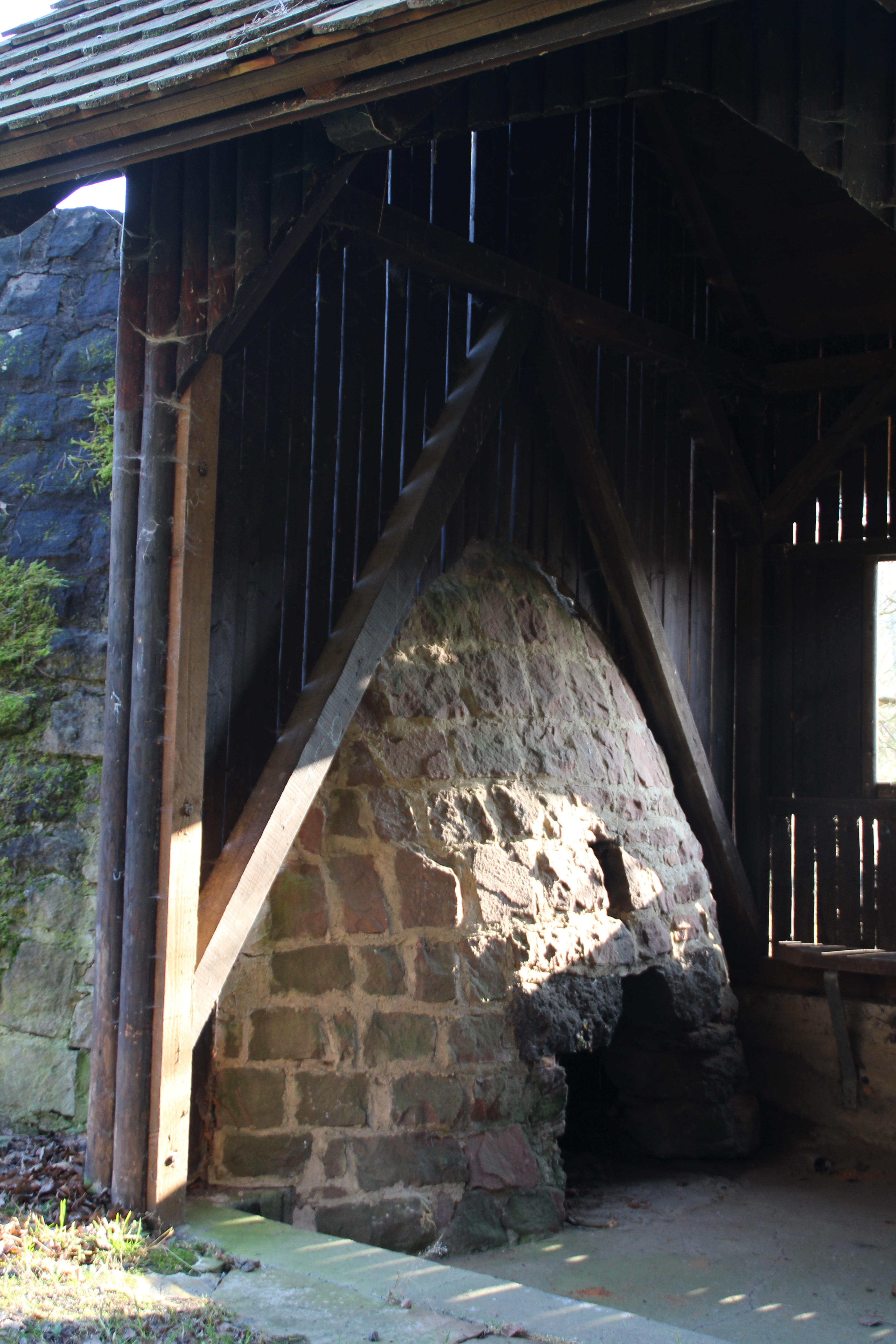 Schmeerofen